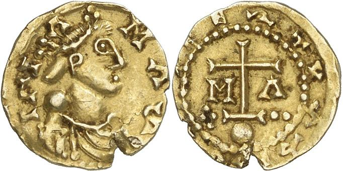 Tremissis de 7 siliques émis par Childebert l'Adopté (656-662). Avers : MAS /ILI/A buste diadémé et drapé à droite. Revers : (CHIL)DEBERTVS RX croix latine pattée, au pied potencé, accostée des lettres M et A, posée sur un globe entre deux séries de points : quatre d’un côté pour X et deux de l’autre, (résidu des chiffres de valeur).